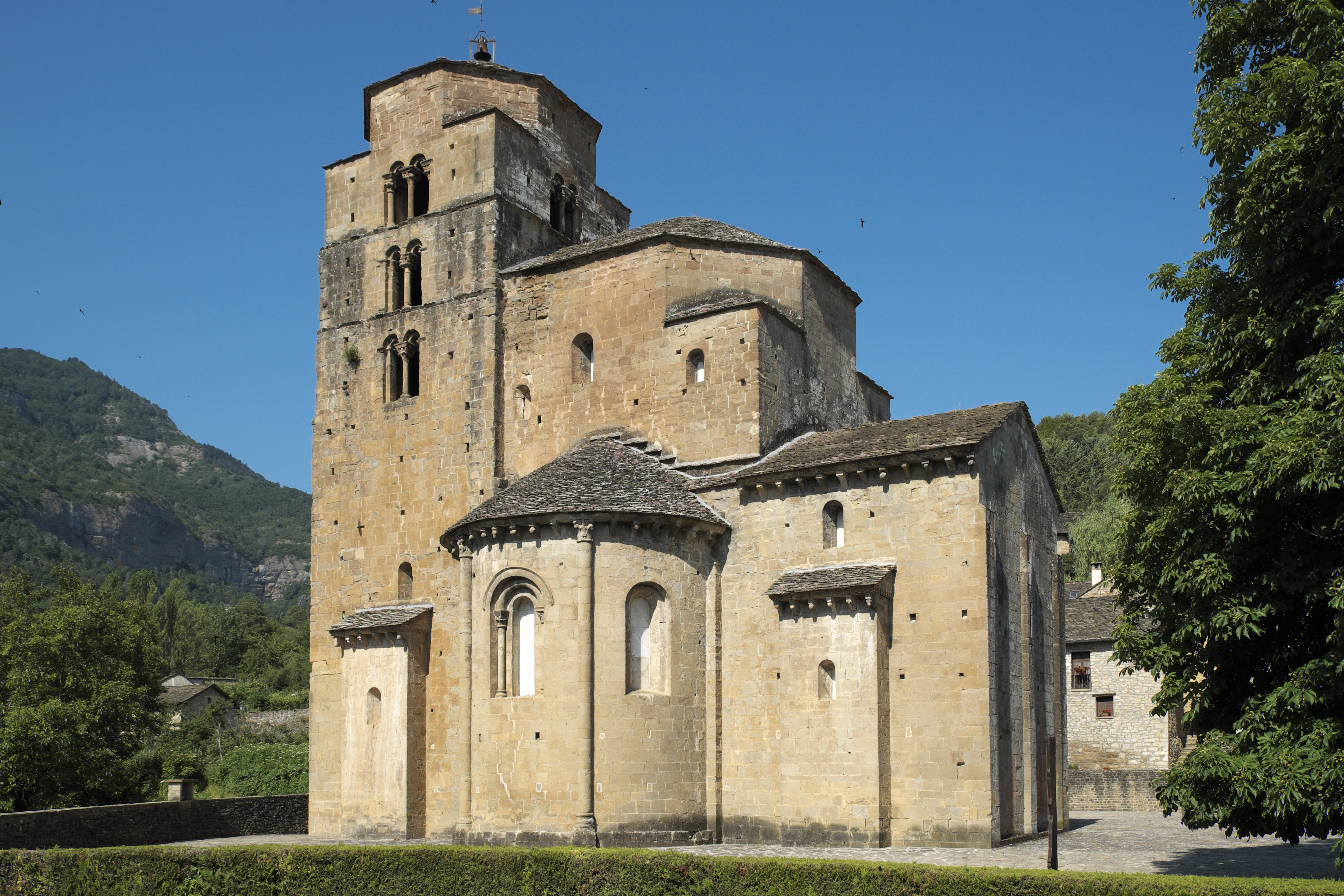 Pfarrkirche und ehemalige Klosterkirche Santa María in Santa Cruz de la Serós in der Provinz Huesca (Aragón/Spanien)